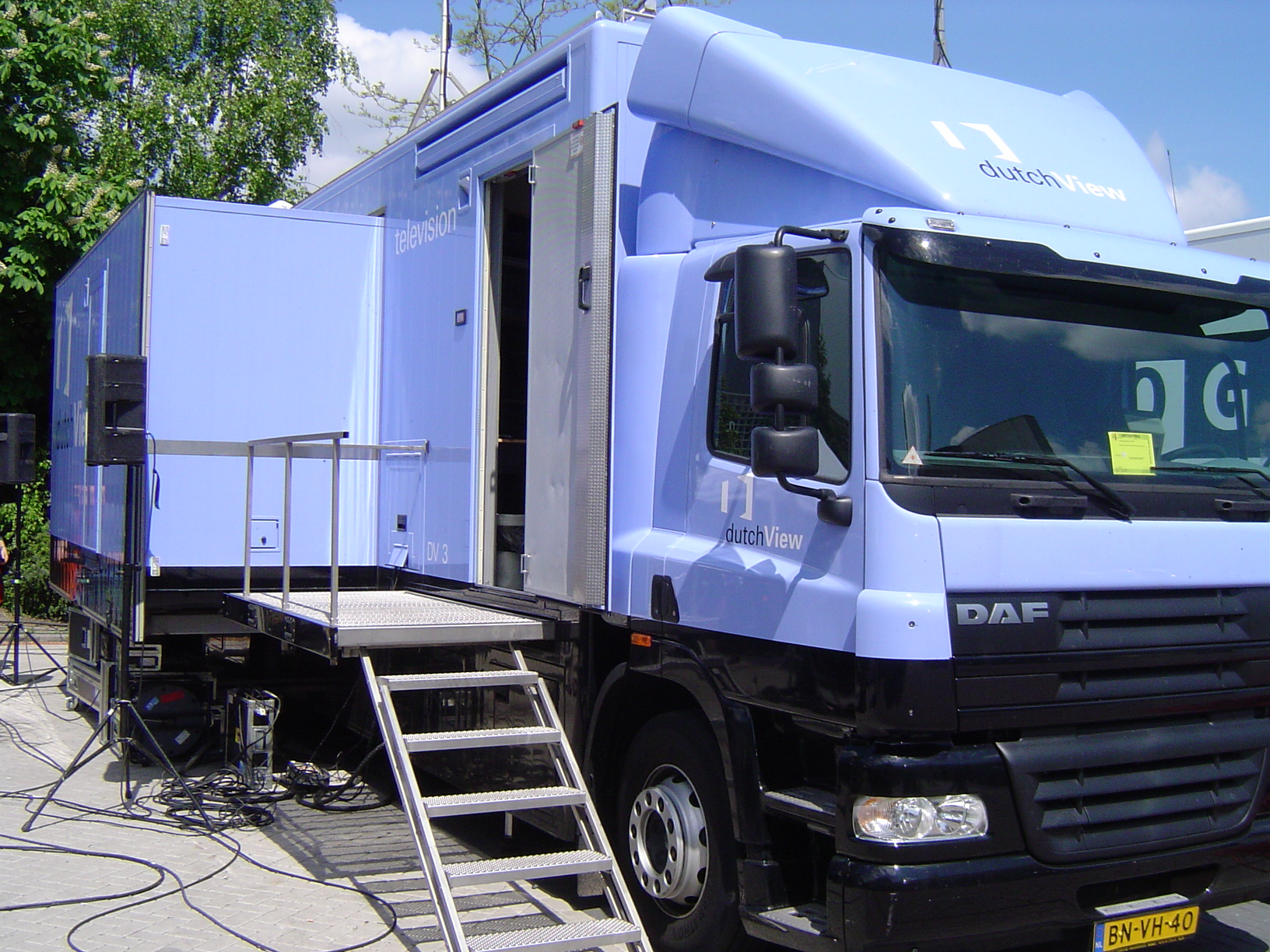 De DV3 is een van de laatste Outside Broadcast Van (OBV) die Dutchview heeft aangekocht. Deze is geheel modulair koppelbaar met de DV1. Foto genomen tijdens de AVManifestatie 2005.